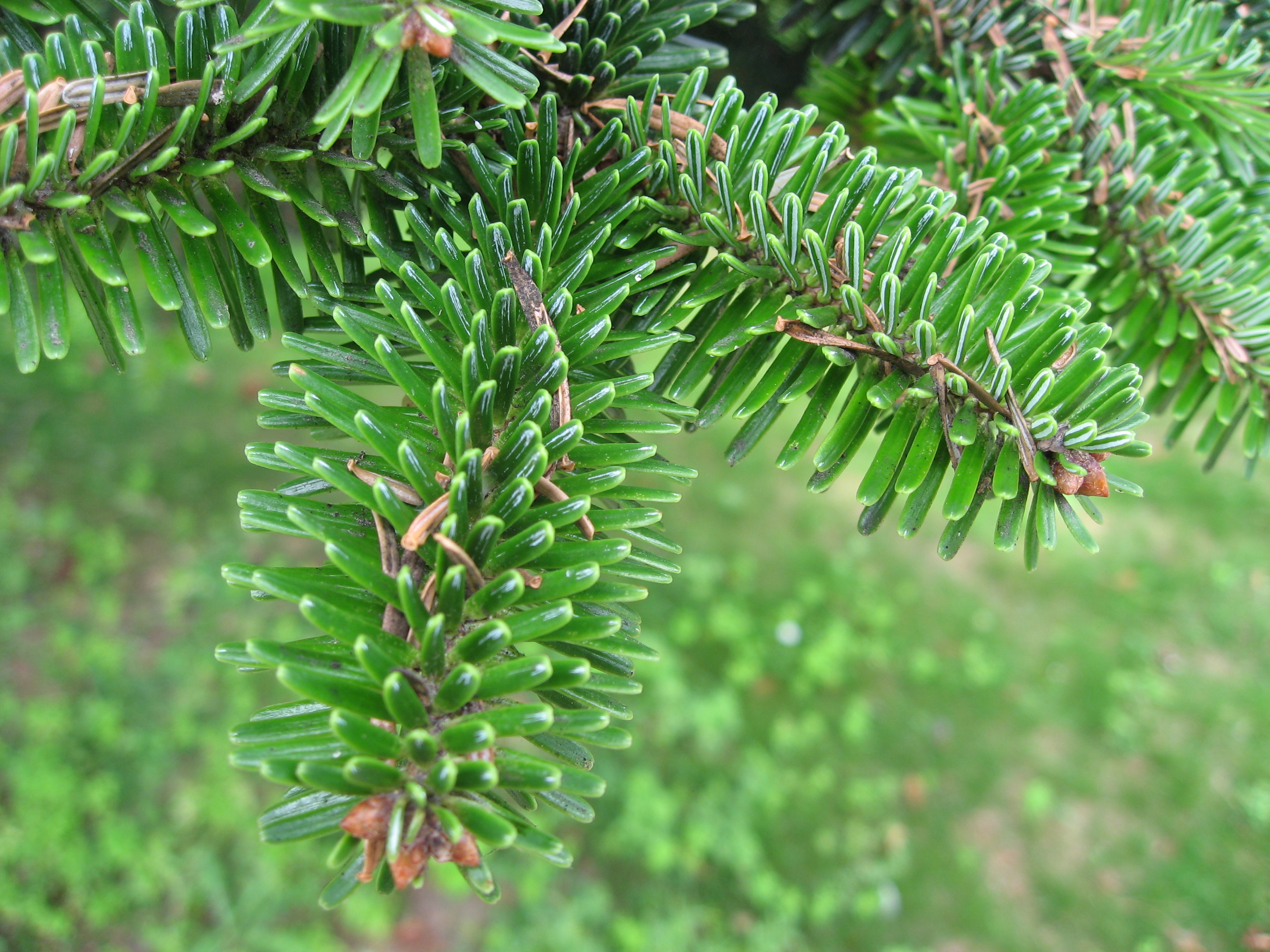 Abies numidica in Serres d'Auteuil Map: 48° 50' 49" N 2° 15' 8" E